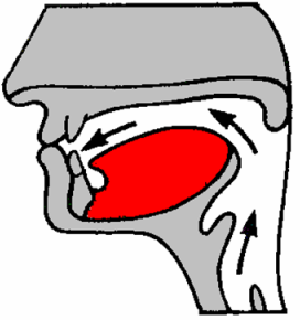 Bilabial in der Phonetik